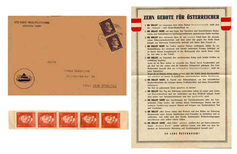 OSS Propagandabrief mit Inhalt.